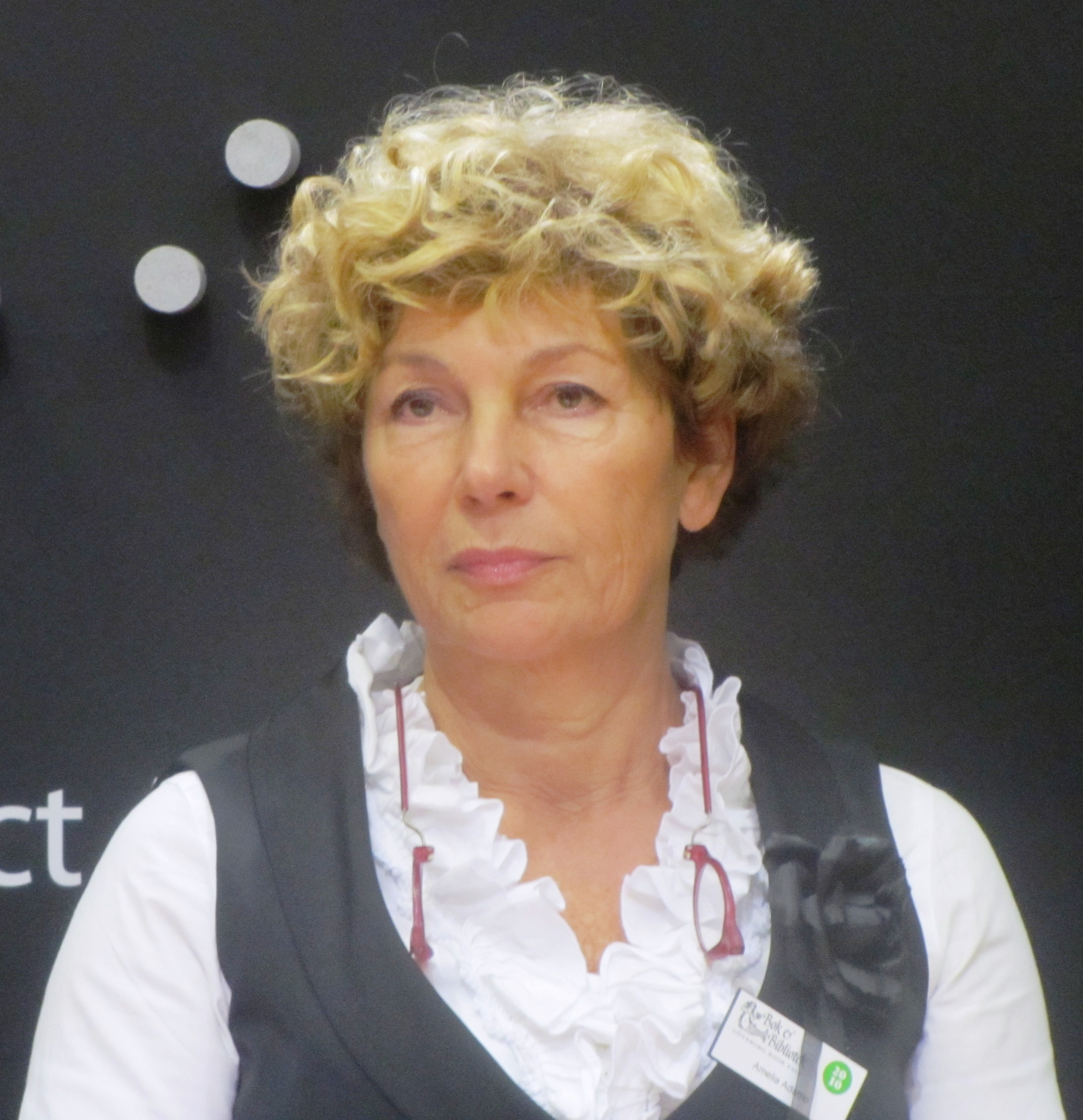 Chefredaktör Amelia Adamo på Bokmässan 2010.